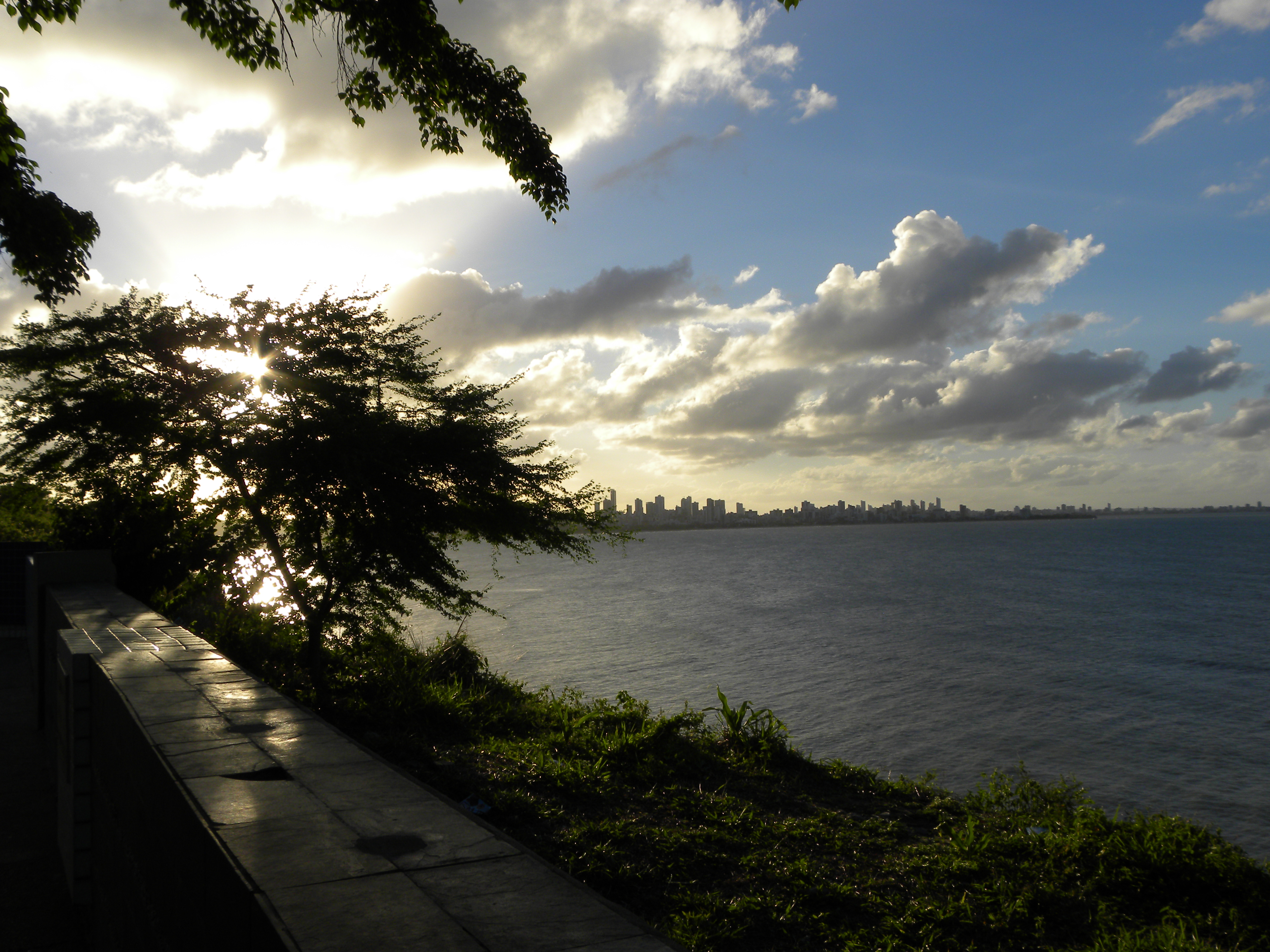 Praia do Cabo Branco